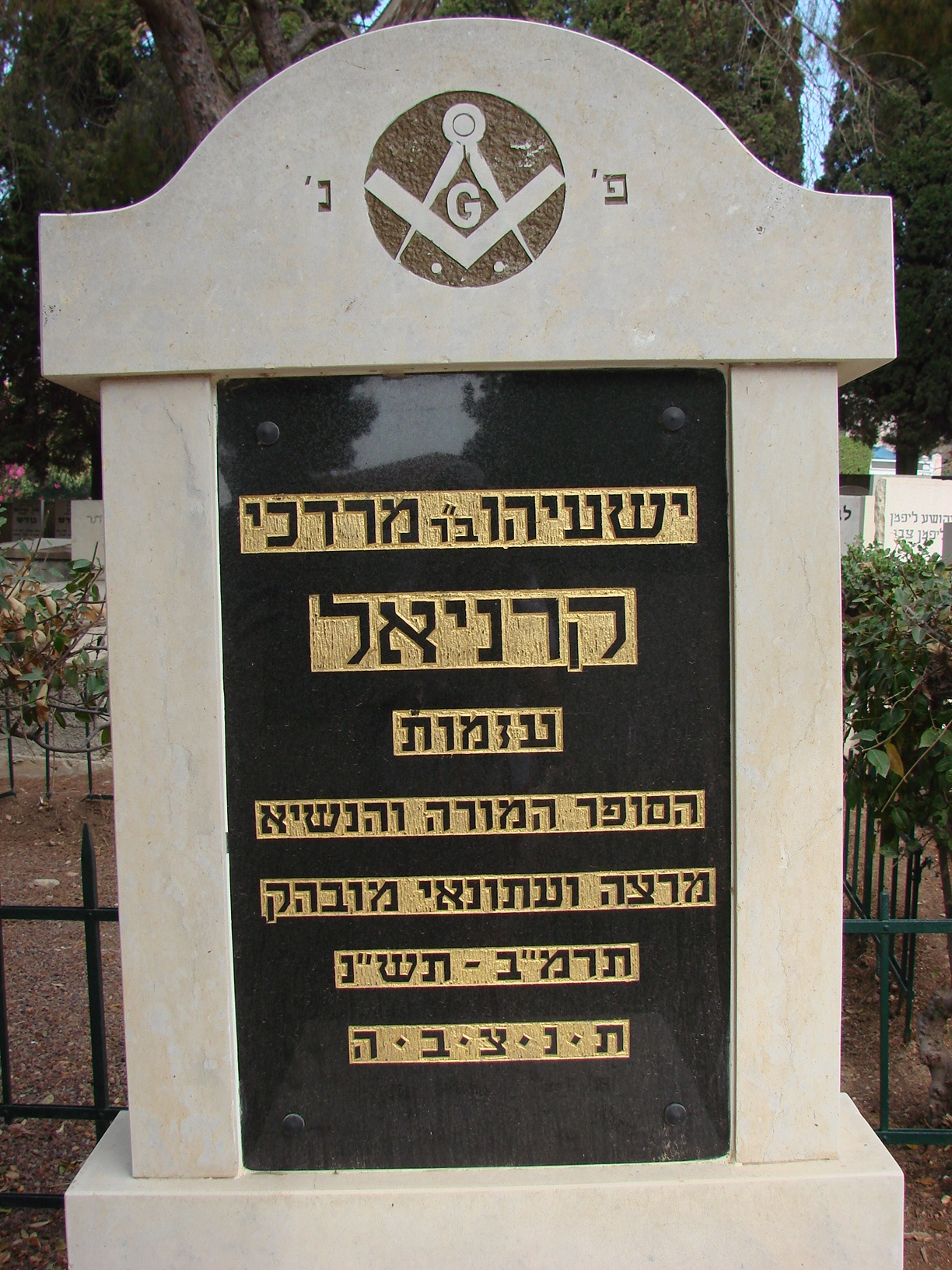 מצבת הקבר של ישעיהו קרניאל